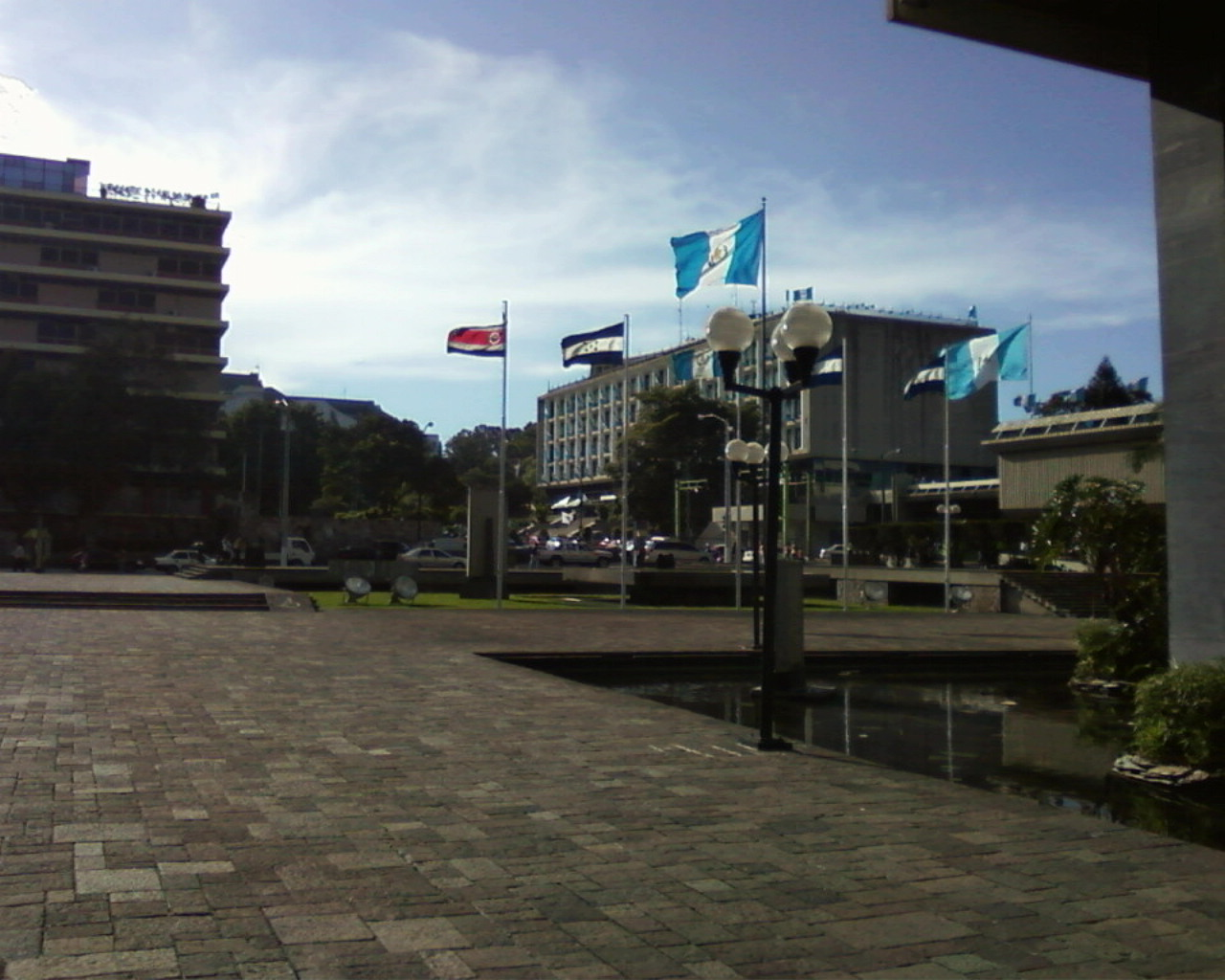 Edificios del IGSS y Credito Hipotecario de Guatemala